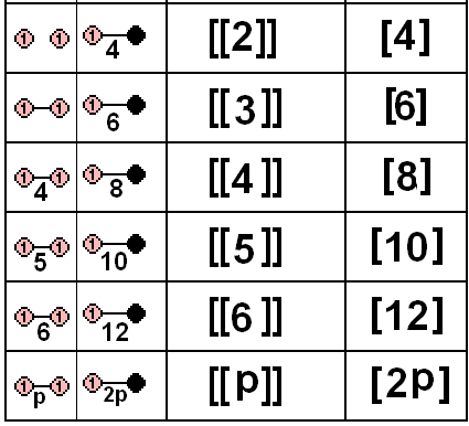 Coxeter-Dynkin diagram